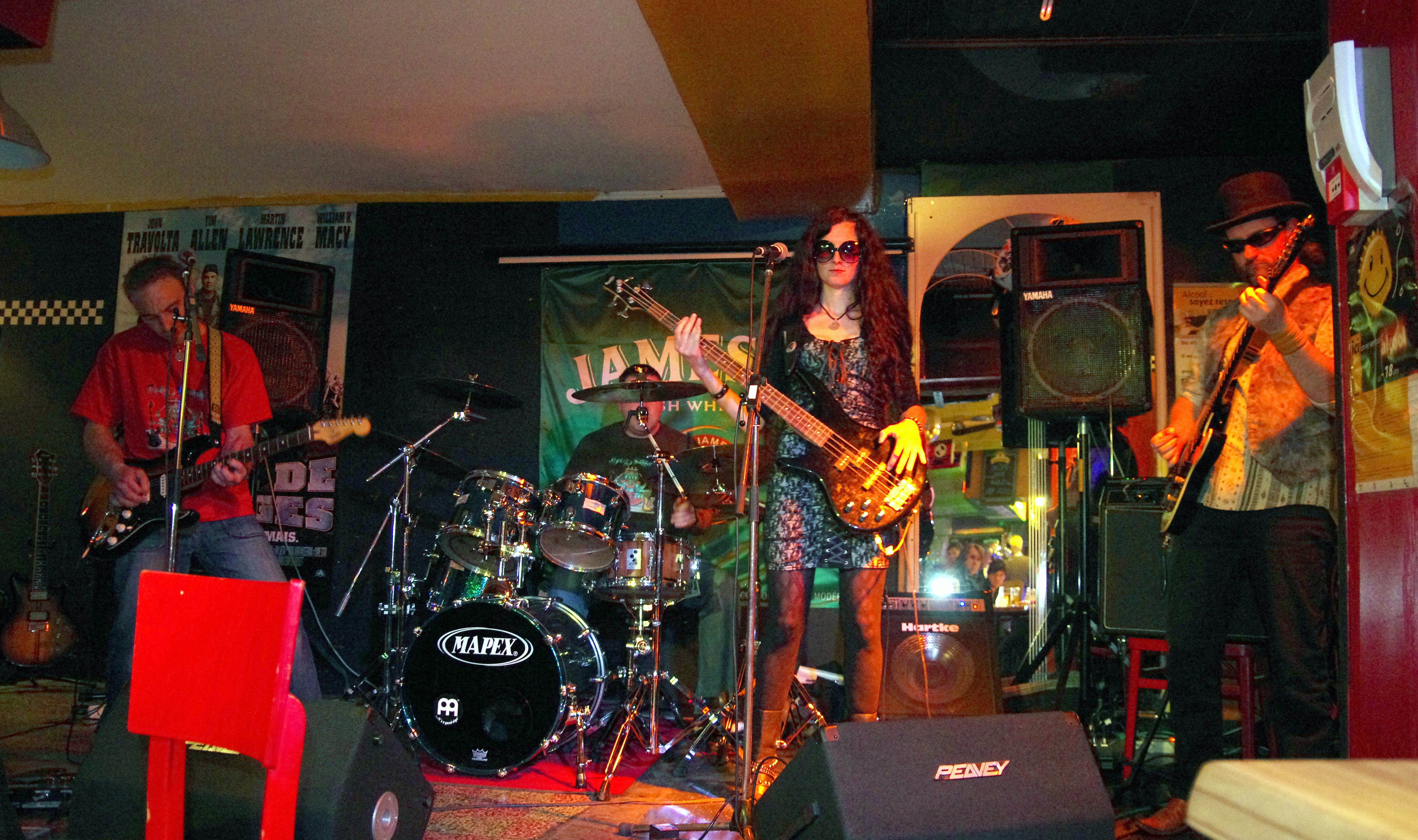 Abbeville (Somme, France) - 17ème édition des "Nuits du Blues" (du 18 au 27 mars 2011). Concert du groupe "Bad Karma", au bar "Le Saint-Pierre". .